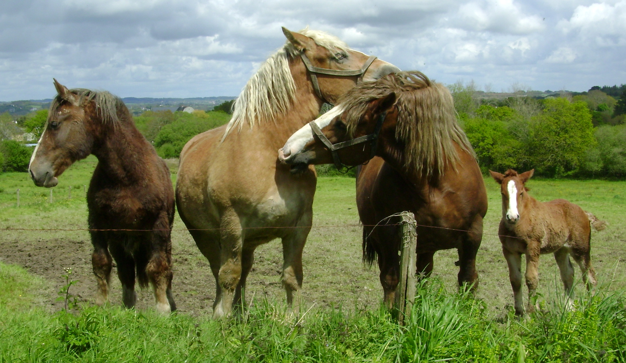 Logonna-Daoulas, postiers bretons.JPG